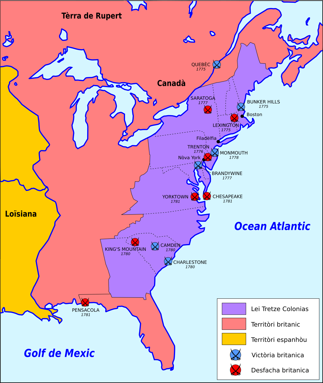 Esquèma simplificat de la Guèrra d'Independéncia deis Estats Units d'America